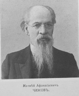 Матвей Афанасьевич Чижов (1838—1916) — русский скульптор, академик и действительный член Императорской Академии художеств.